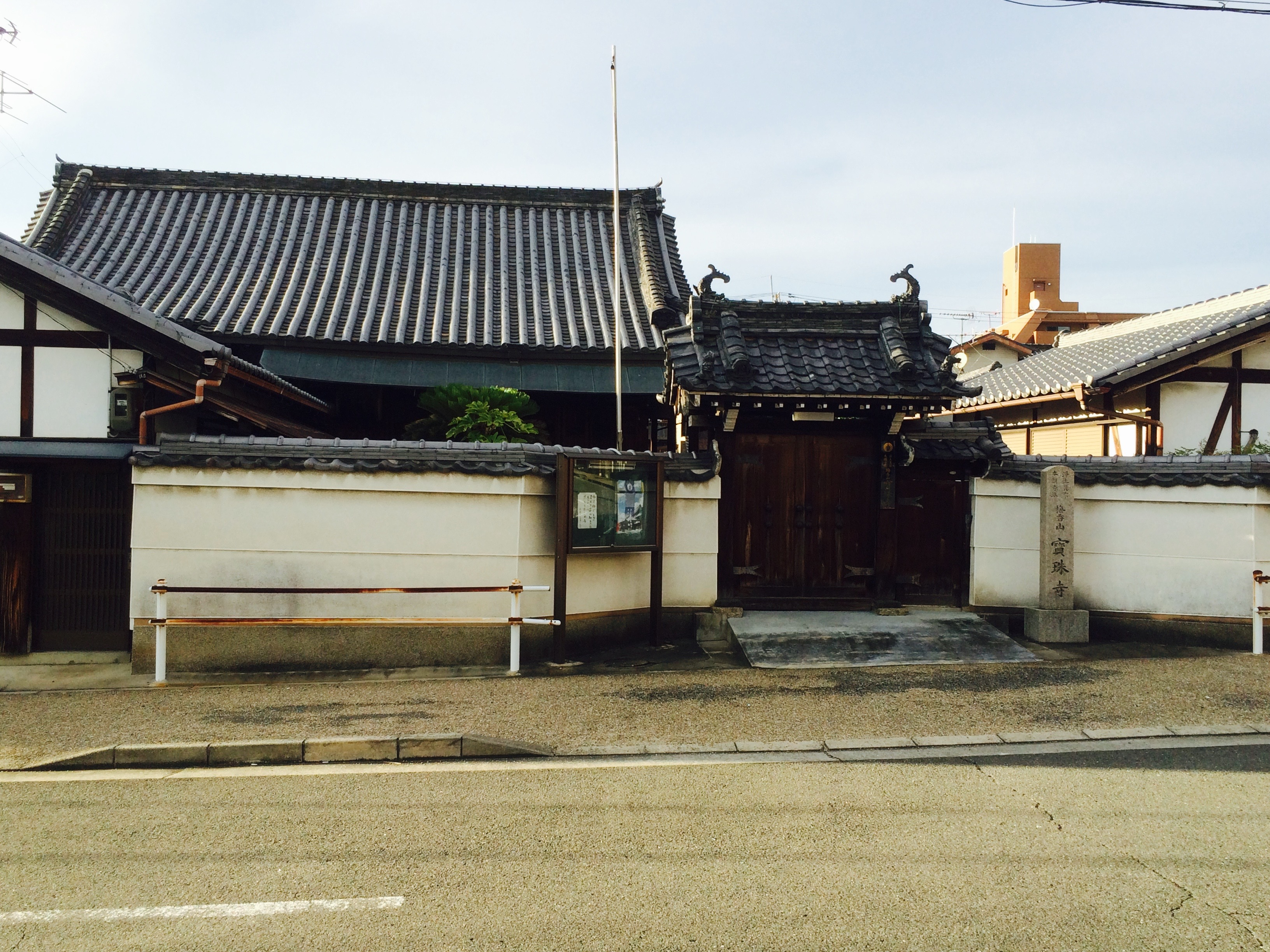 奈良市宝�珠寺